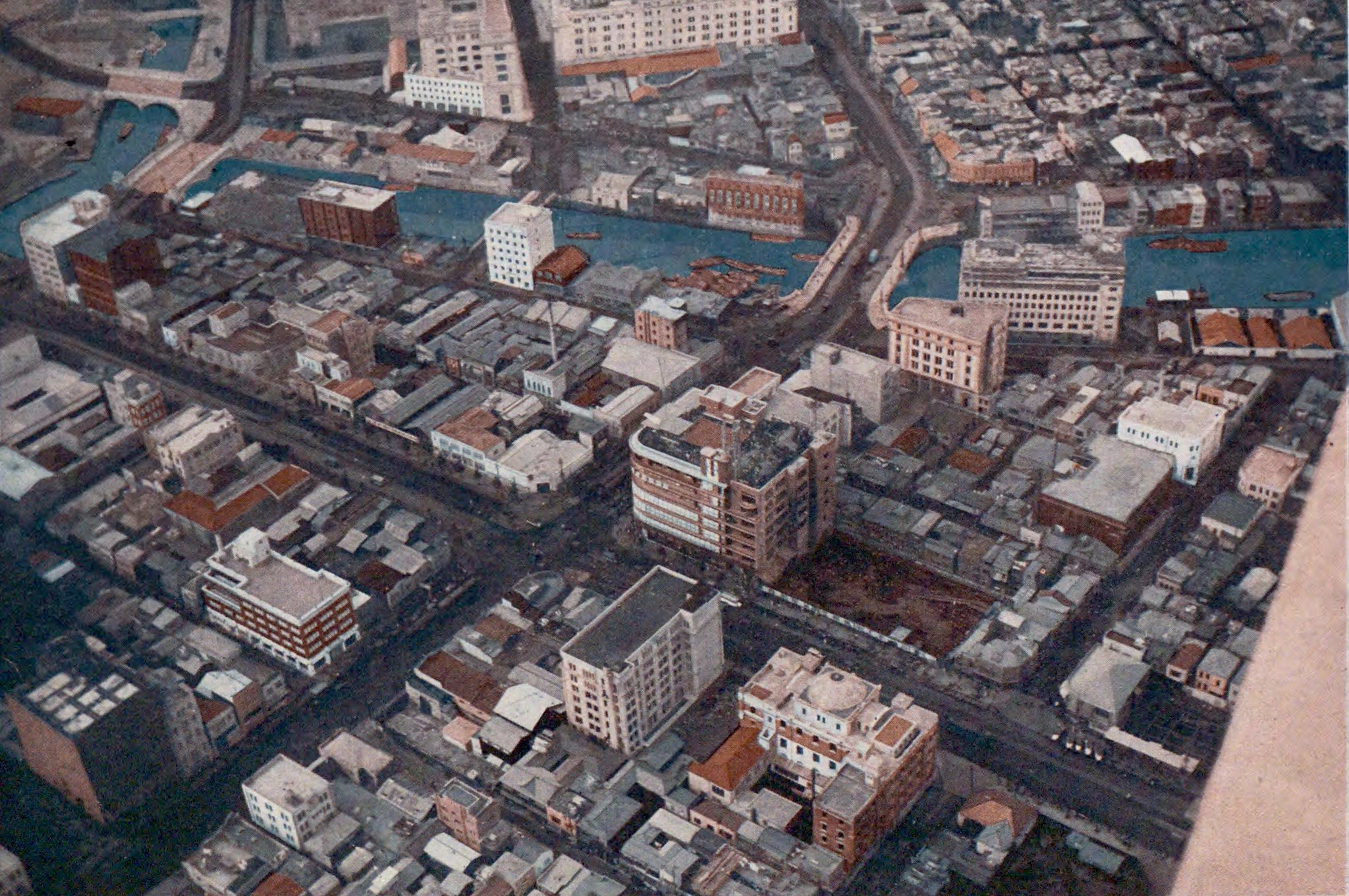 日本橋 航空写真